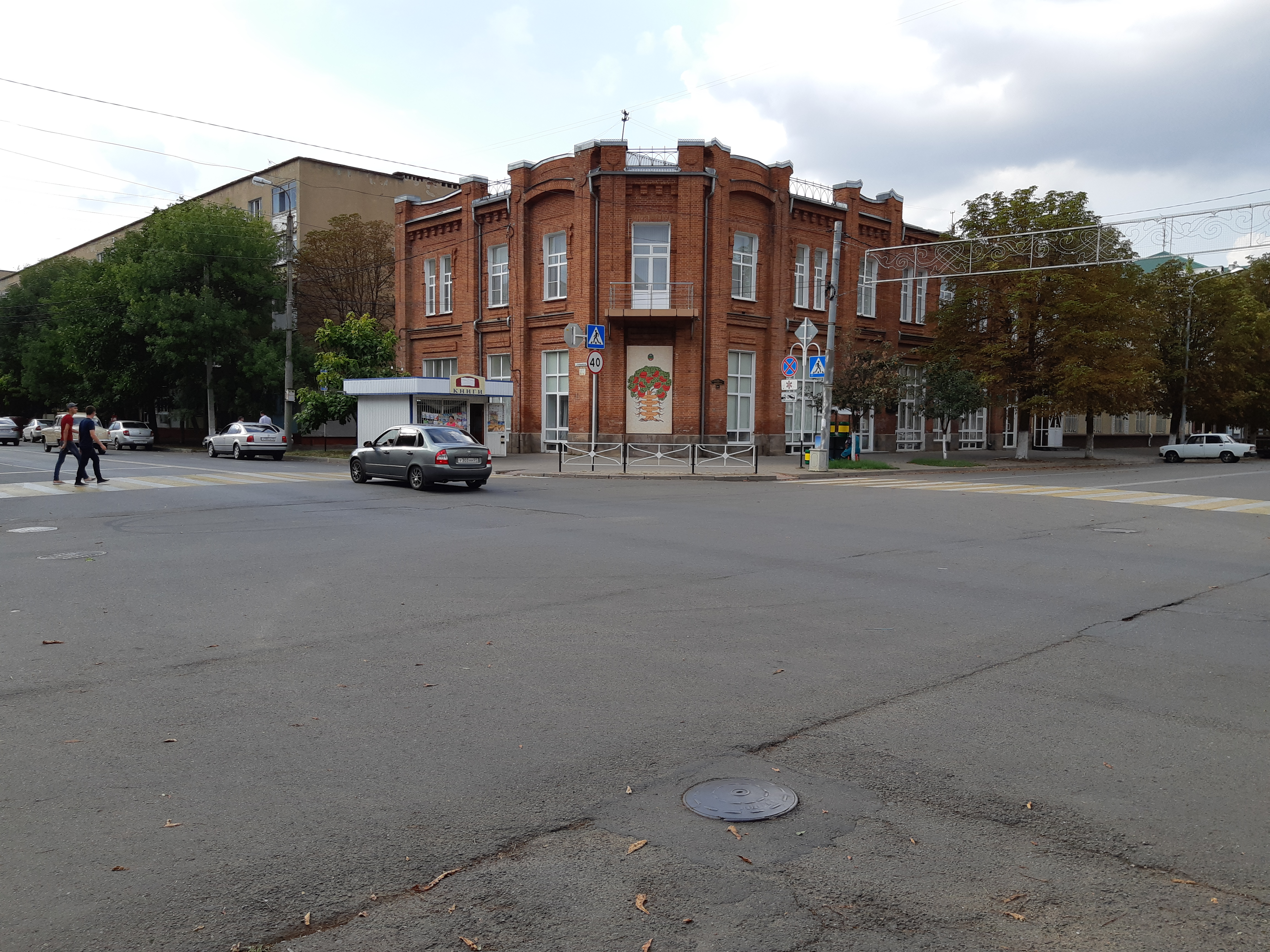 Площадь, где на митинге бойцов 1-й конной армии выступили С.М. Буденный и К.Е. Ворошилов: улица Краснооктябрьская, 13, Майкоп, Адыгея